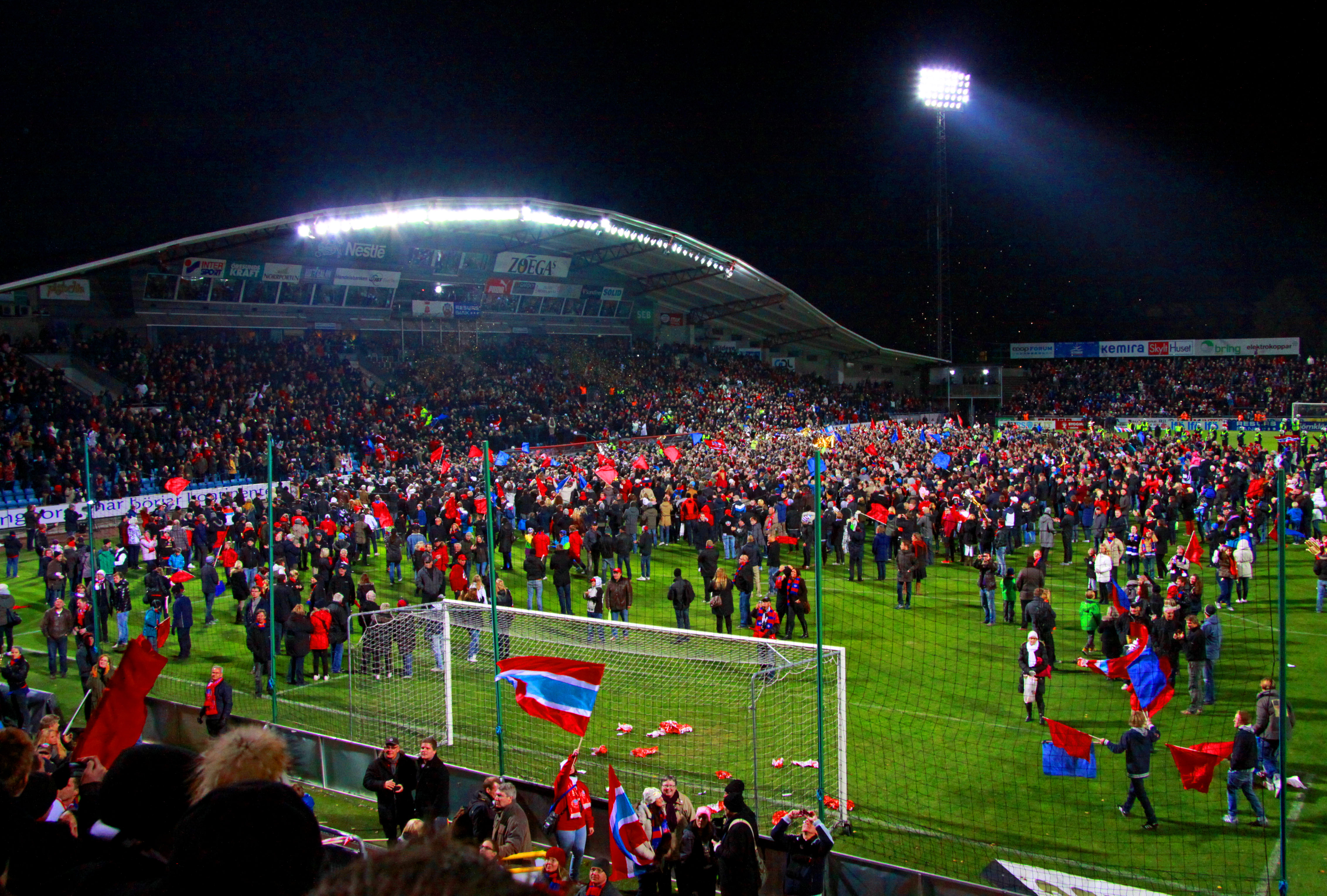 Helsingborg. SM guld!